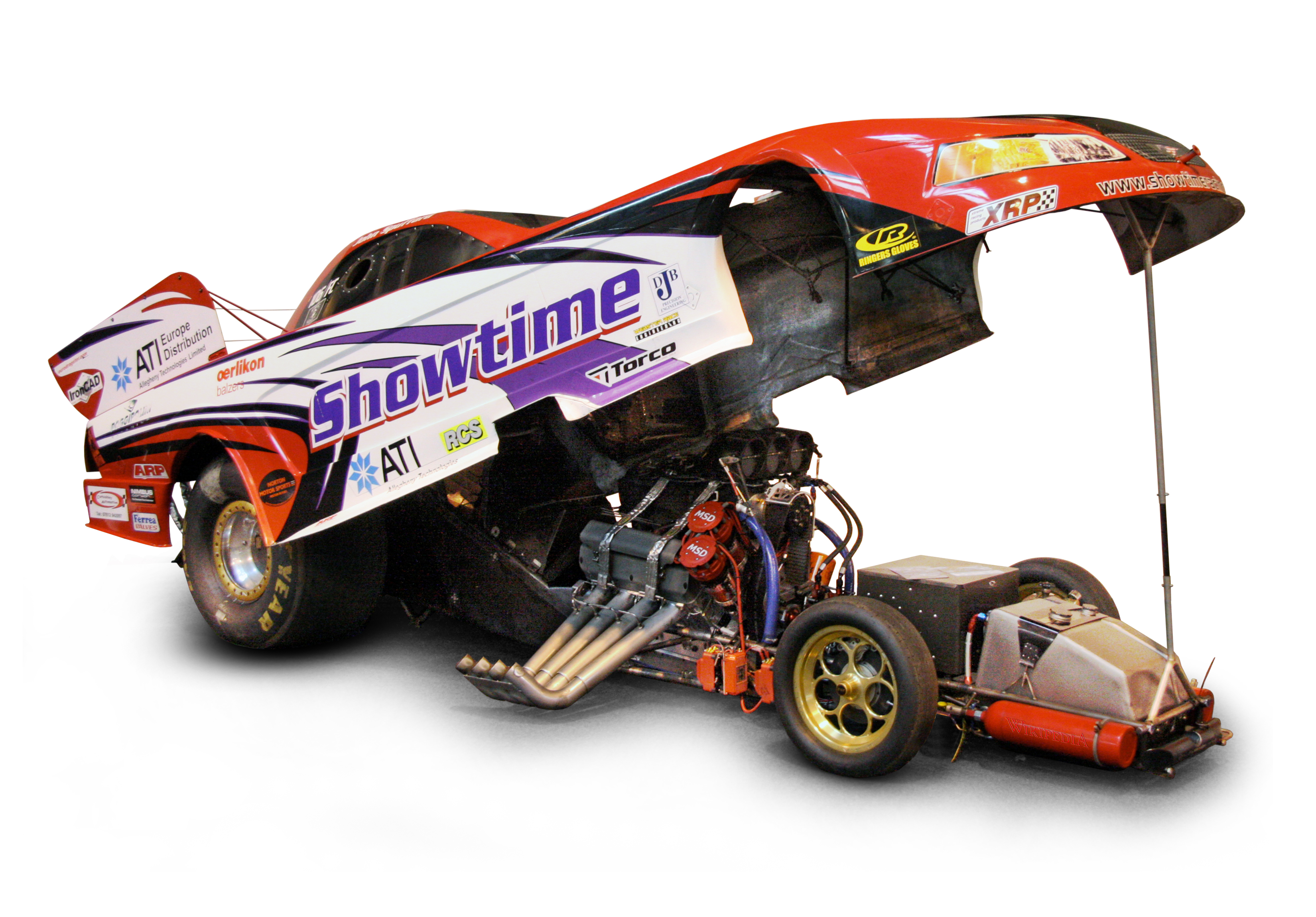 Top Fuel Funny Car "Showtime" von John Spufford (UK) mit hochgeklapptem "Body"